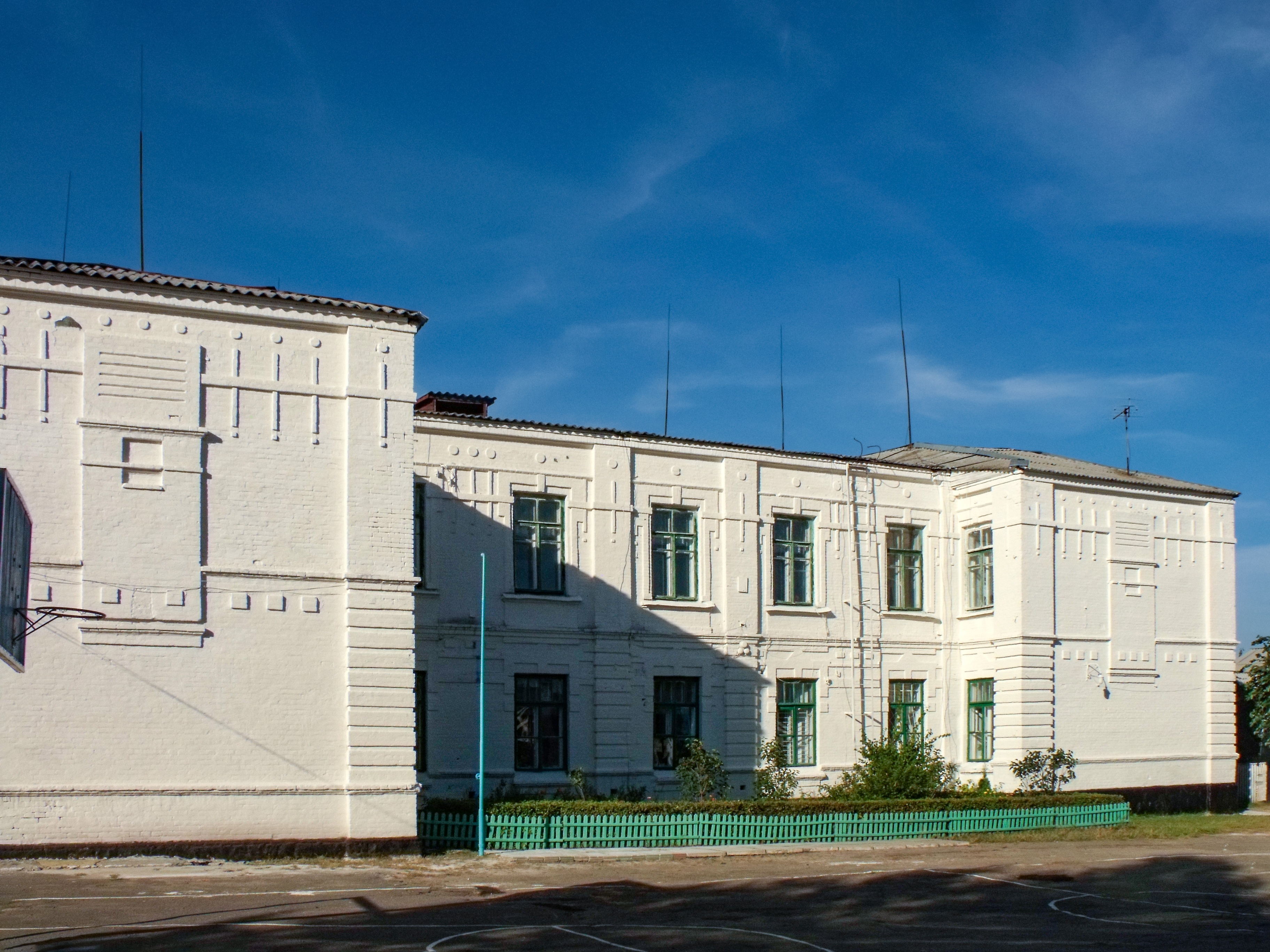 Школа №3: Вінницька обл, м.Жмеринка (вигляд з двору)